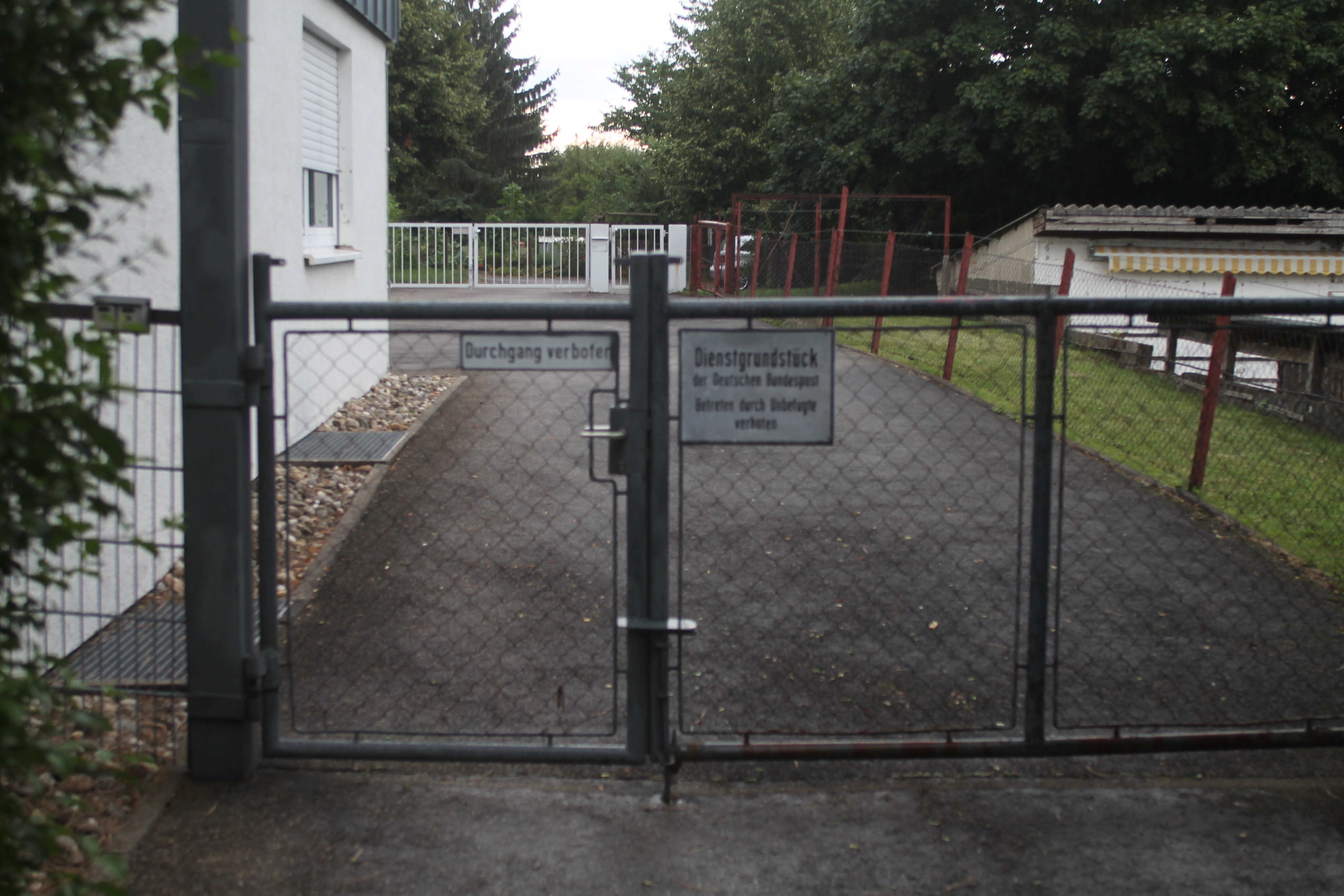 Eingang zum Postgebäude Hoffeld. Man beachte das Schild "Deutsche Bundespost" - OpenStreetMap(Info)